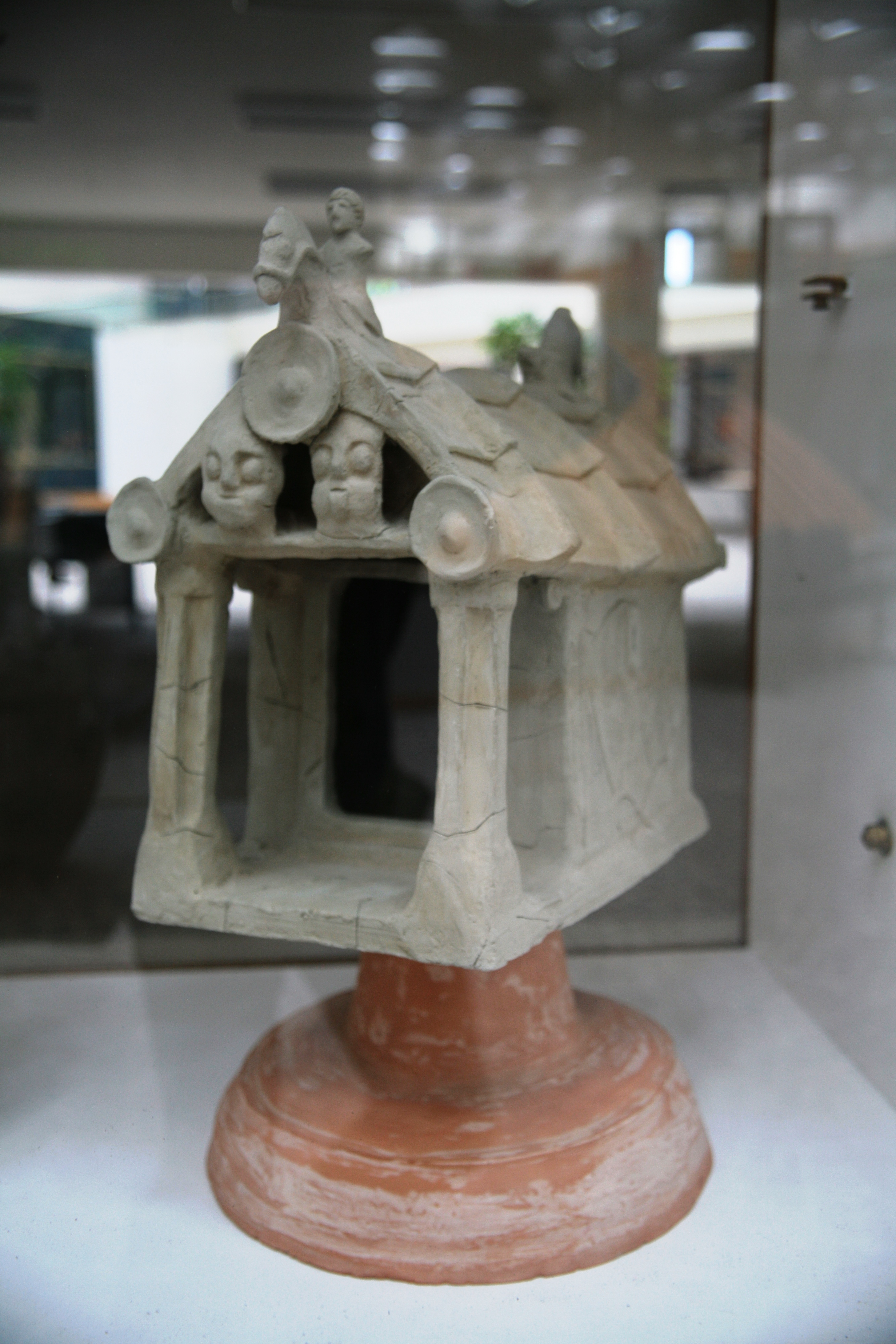 Museo Archeologico regionale di Caltanissetta: Copia per non vedenti del Tempietto di Sabucina